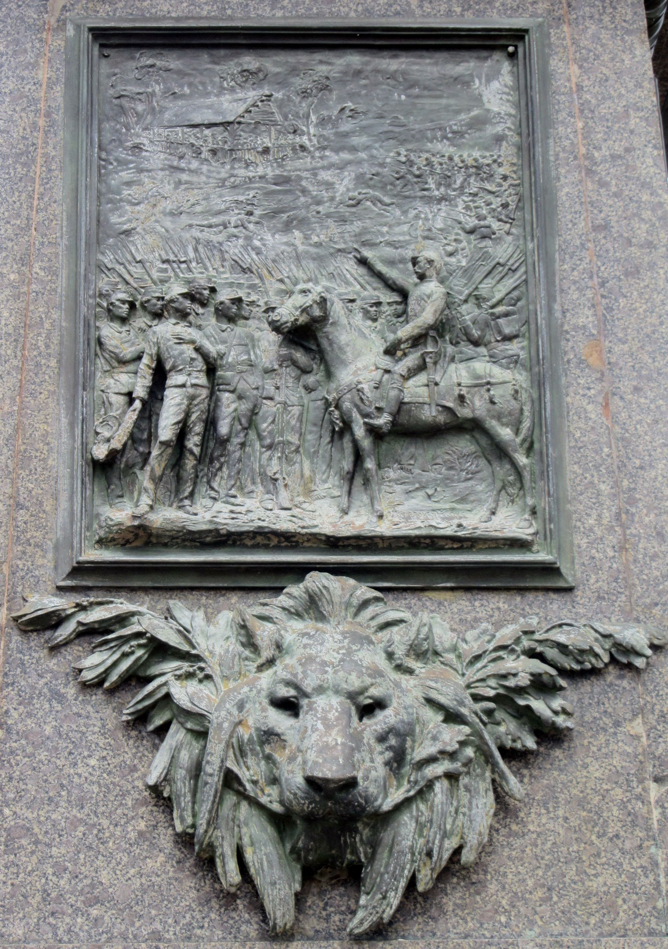 Bajorrelieve en estatua de Juan Santamaía, Alajuela, Costa Rica